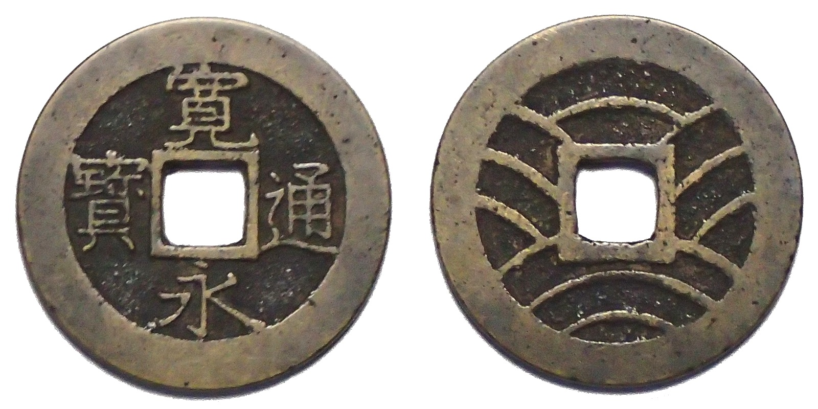 寛永通寳・明和期千田新田銭, 十一波